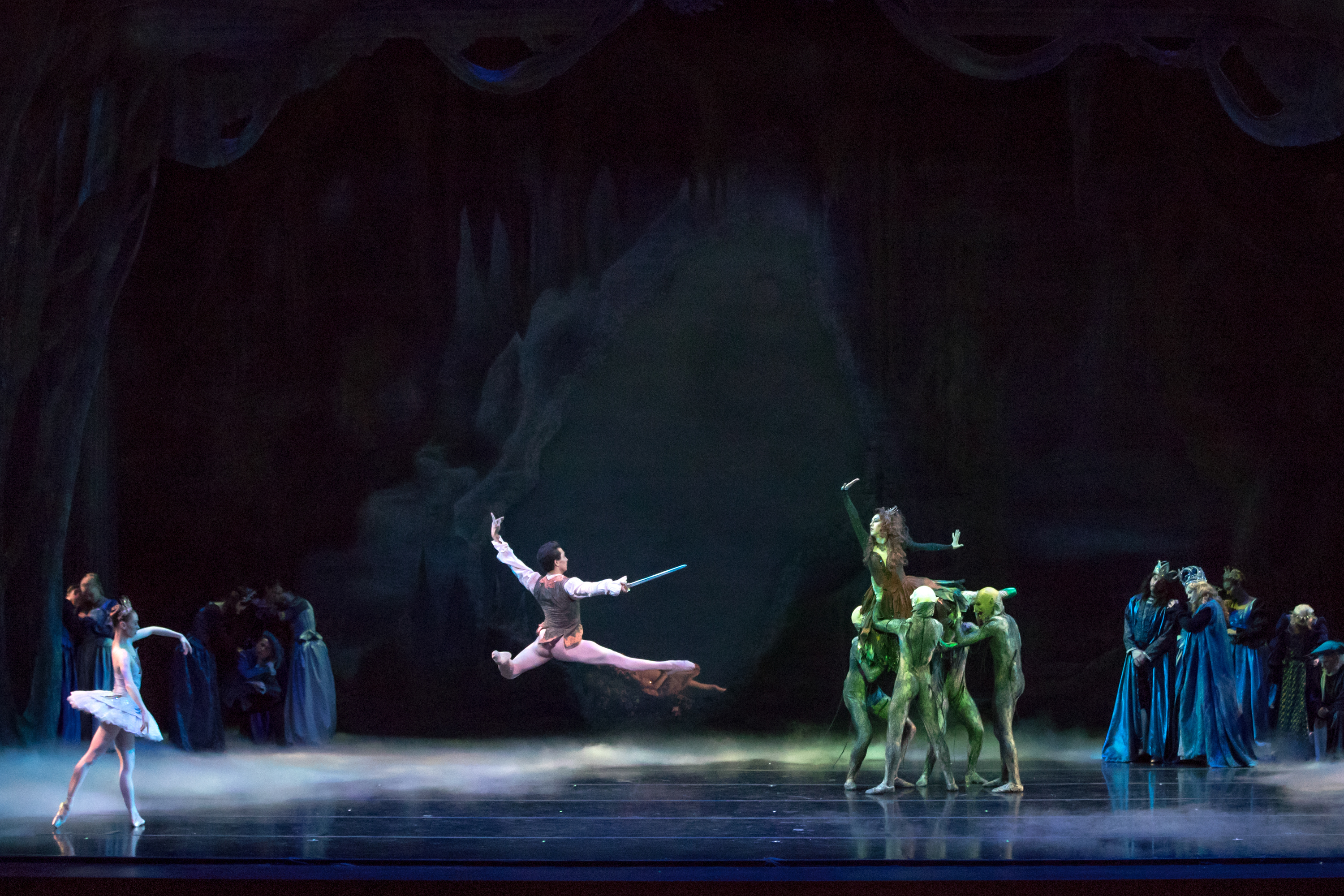 Dancers Kaleena Burks, Lamin Pereira dos Santos, and Danielle Bausinger. Photography: Brett Pruitt & East Market Studios.